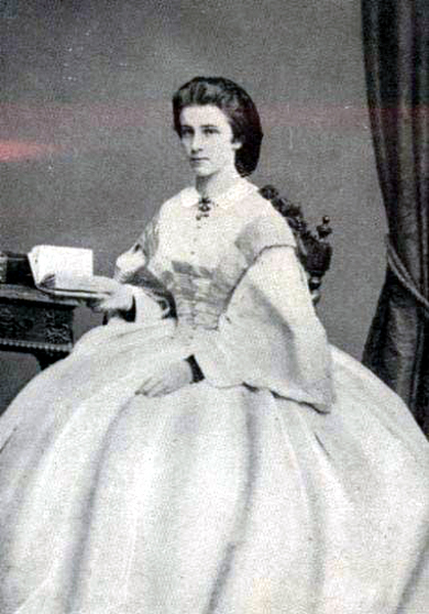 Herzogin Mathilde Ludovika (1843–1925) in Bayern Gräfin Trani auf einer zeitgenössischen Fotografie.